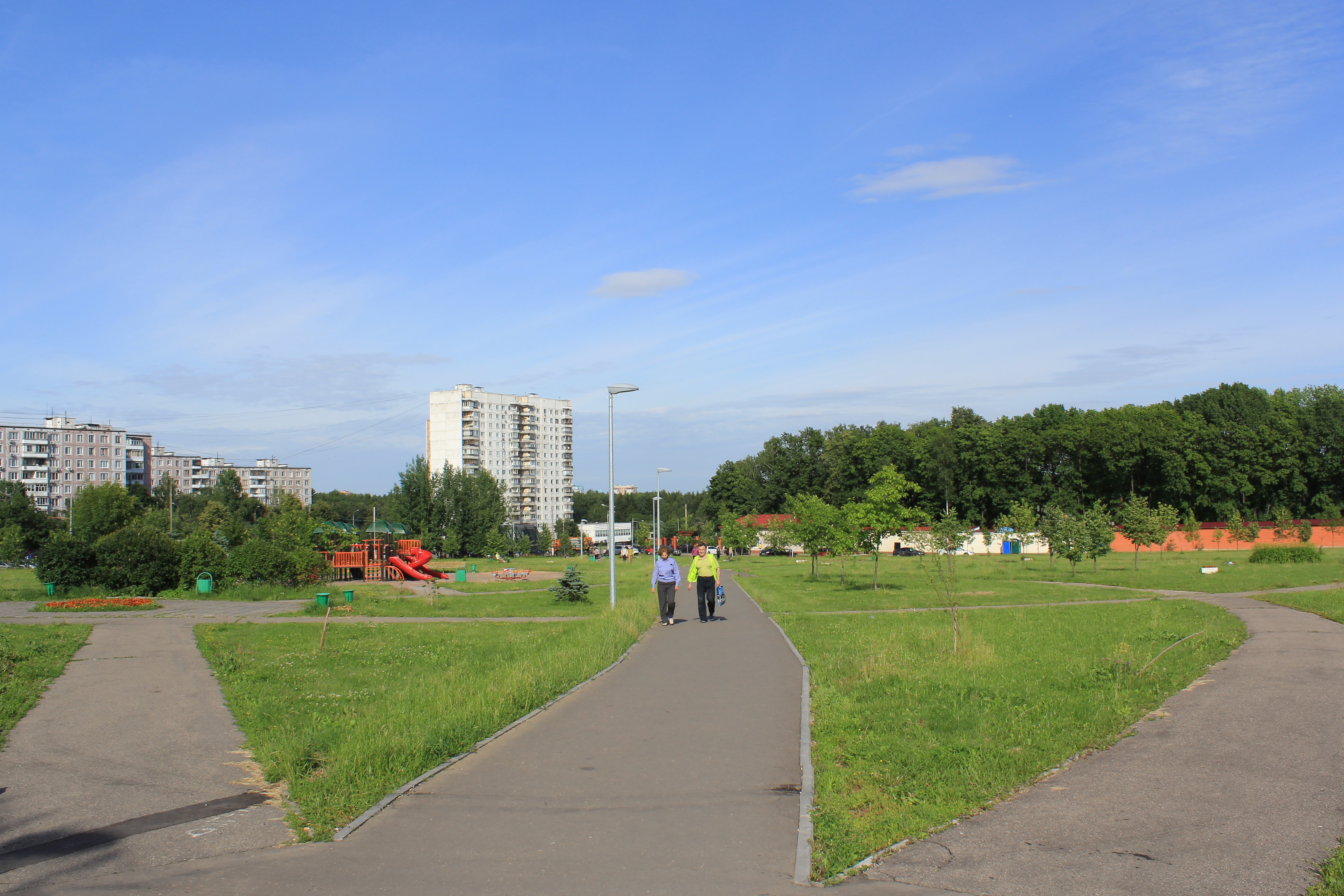 Вид на парк 30-ти летия района Ясенево